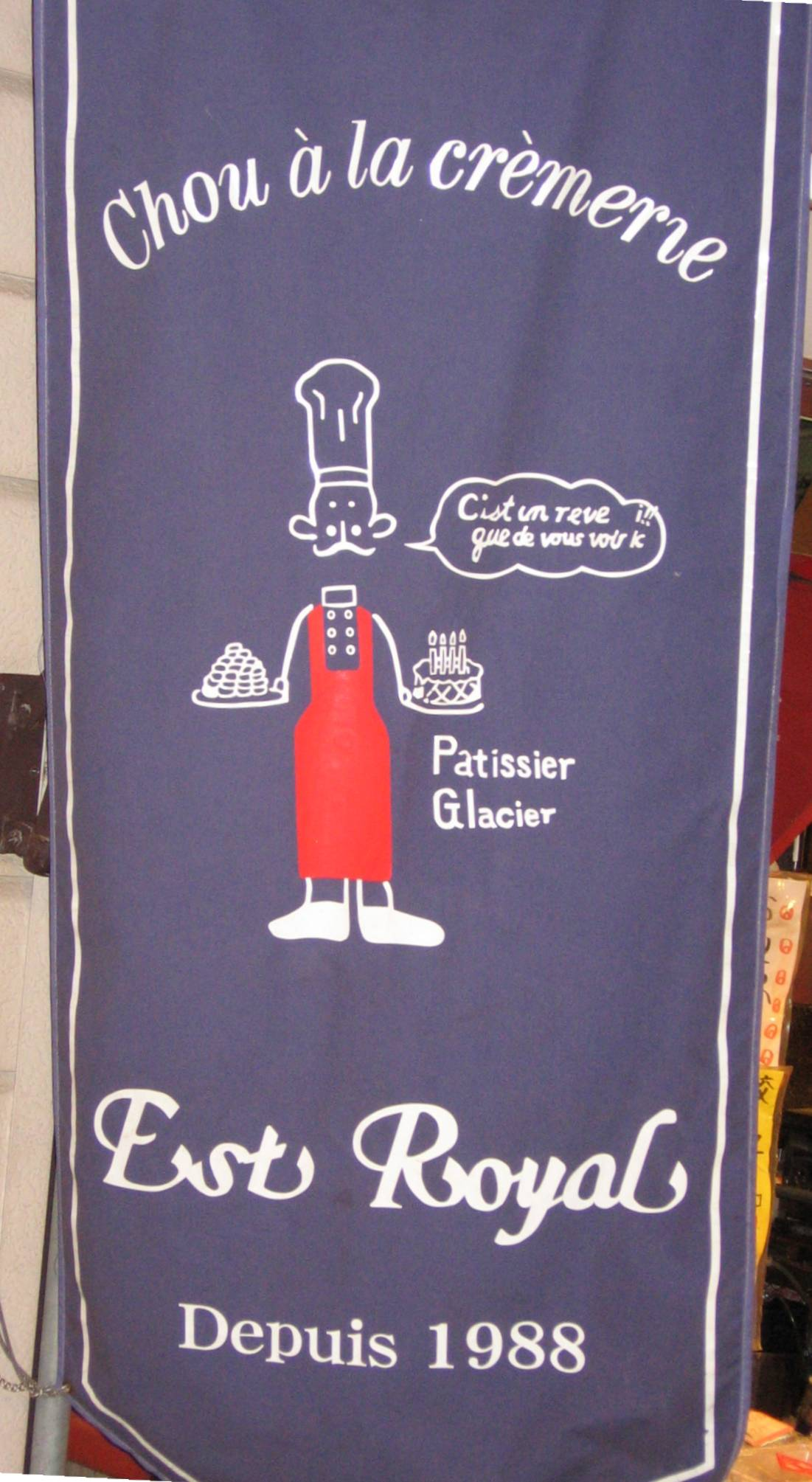 Exemple de Franponais à Kōbe. 12/2005.